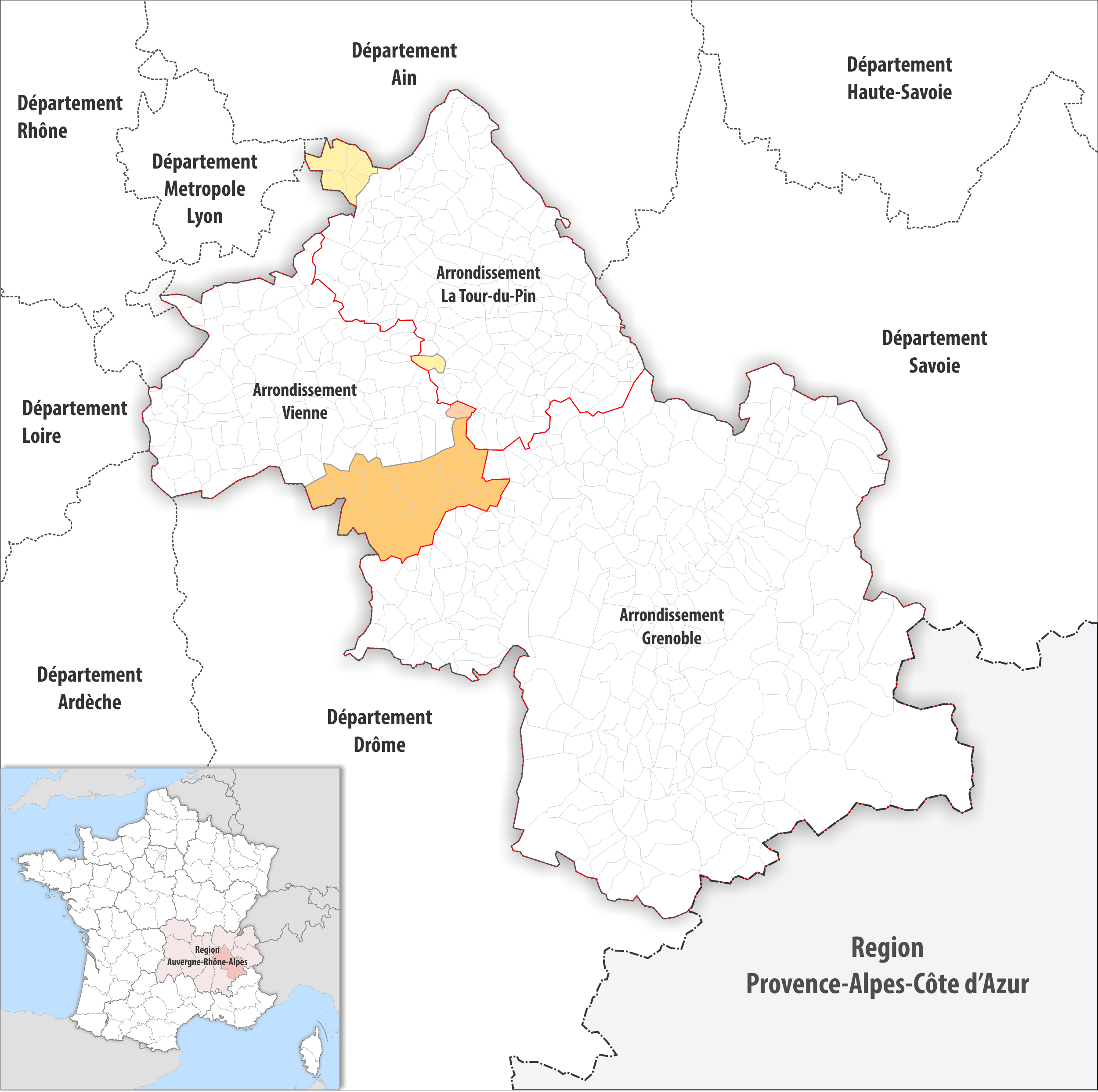 Arrondissements Anpassungen auf 2017 im Departement Isère